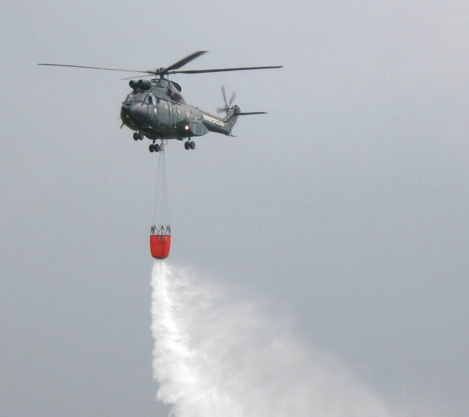 Eine SA 330 Puma der Bundespolizei bei einem Vorführungslöscheinsatz mithilfe eines Bambibucket, fotografiert beim internationalen Großflugtag, 27.08.2006 in Sankt Augustin-Hangelar.